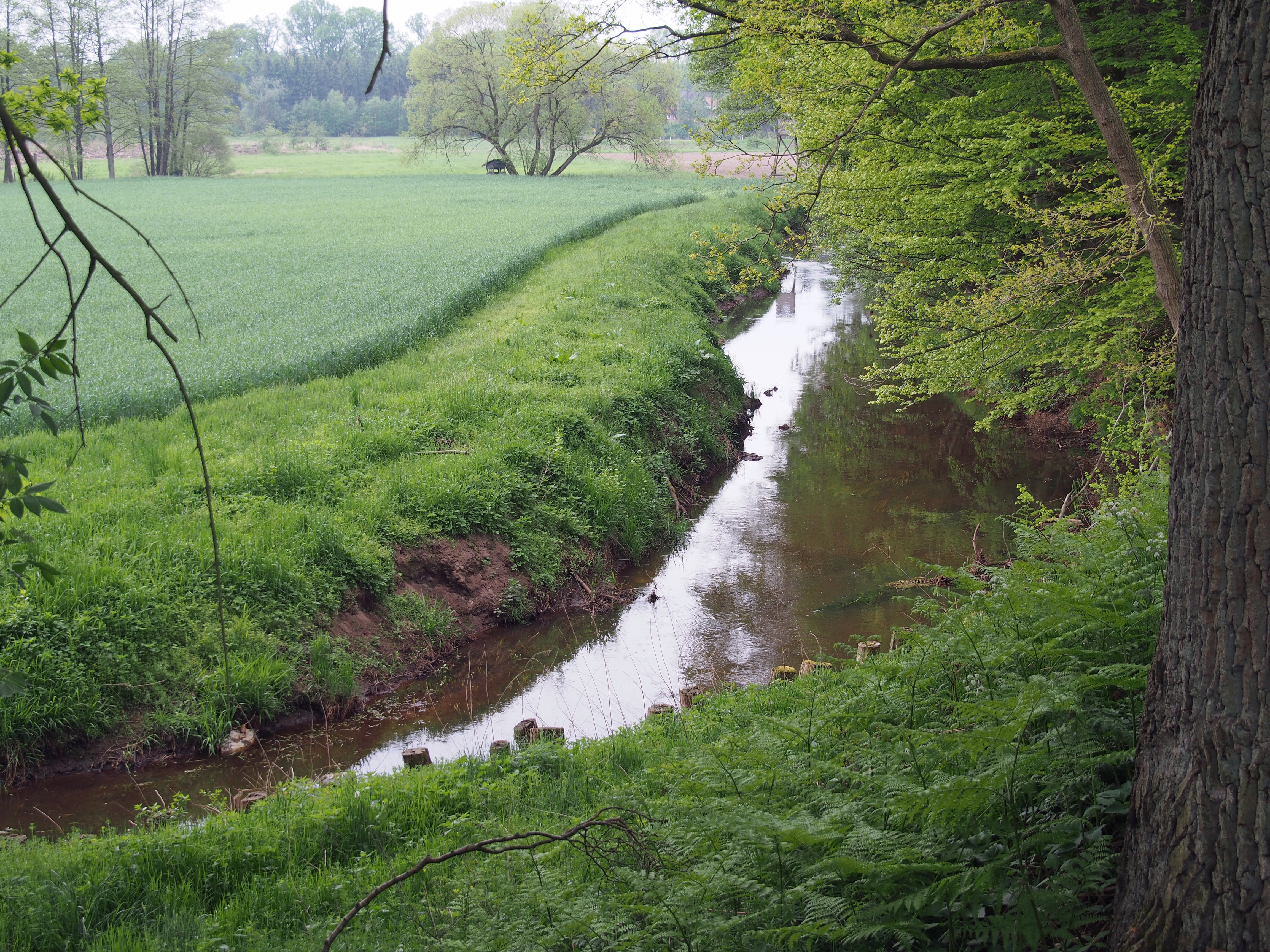 Die Wietze zwischen Halmern und Reddingen, Niedersachsen, Germany